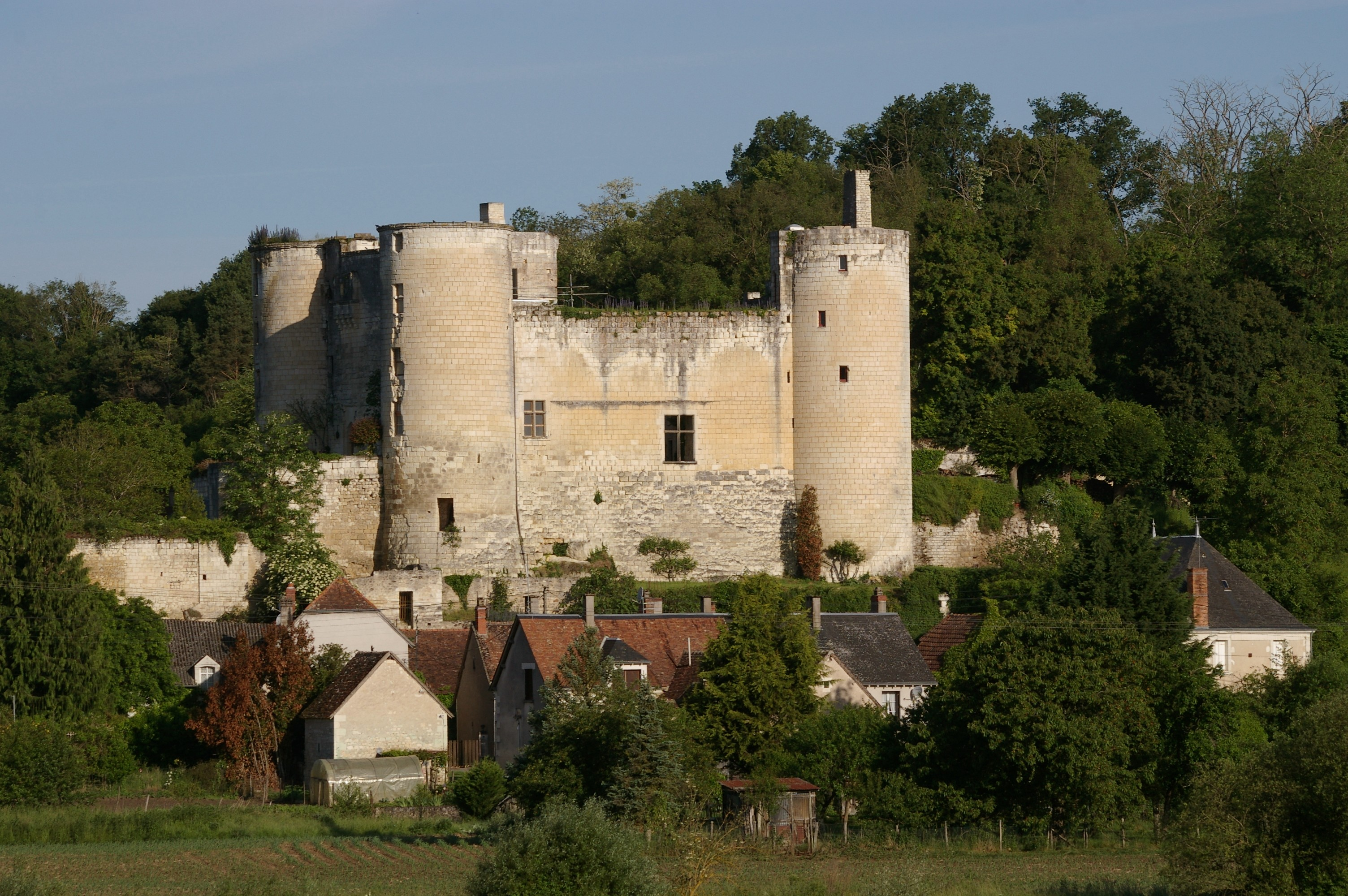 Burg Villentros